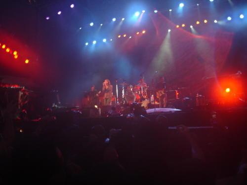 Pearl Jam's concert at Pacaembu Stadium - Sao Paulo, Brazil